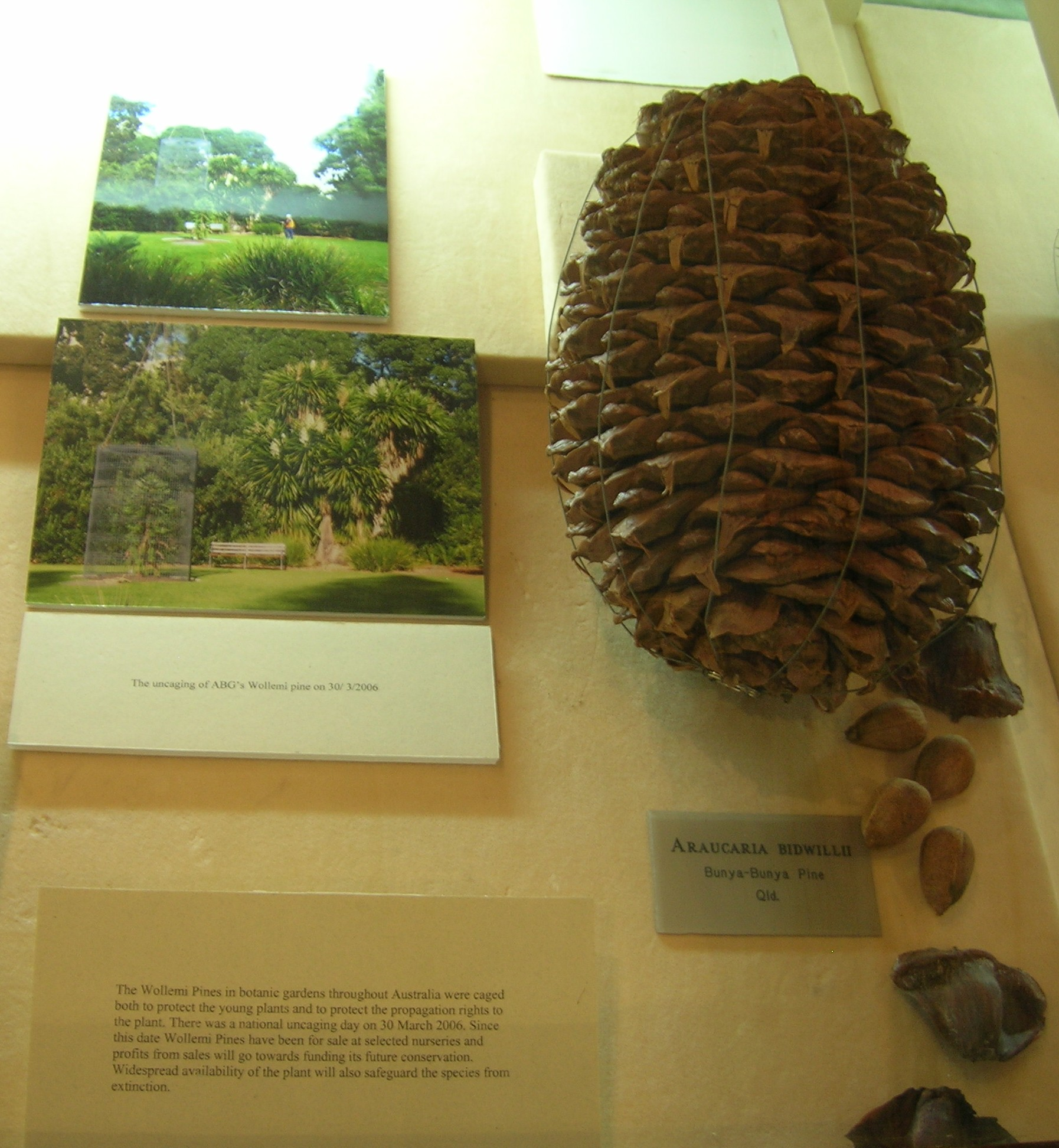 Araucaria bidwillii (Bunya pine) Araucariaceae i040707 312